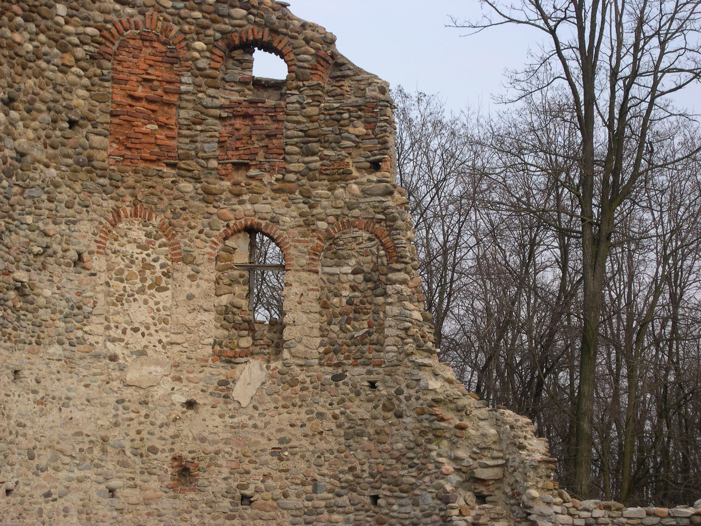 Resti della Chiesa di San Giovanni Evangelista nel Castrum di Castelseprio